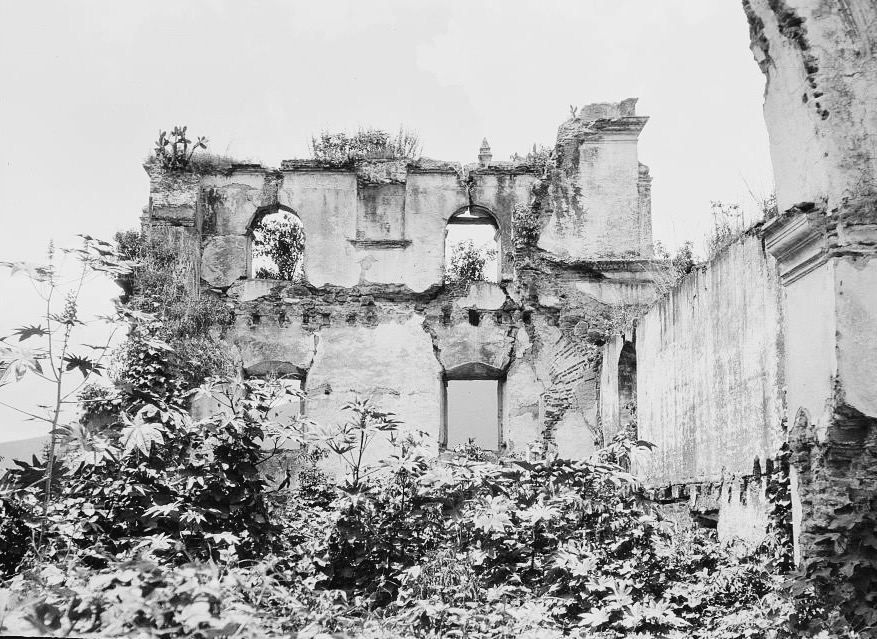 Ruinas del Convento de San Francisco en Antigua Guatemala en 1916.